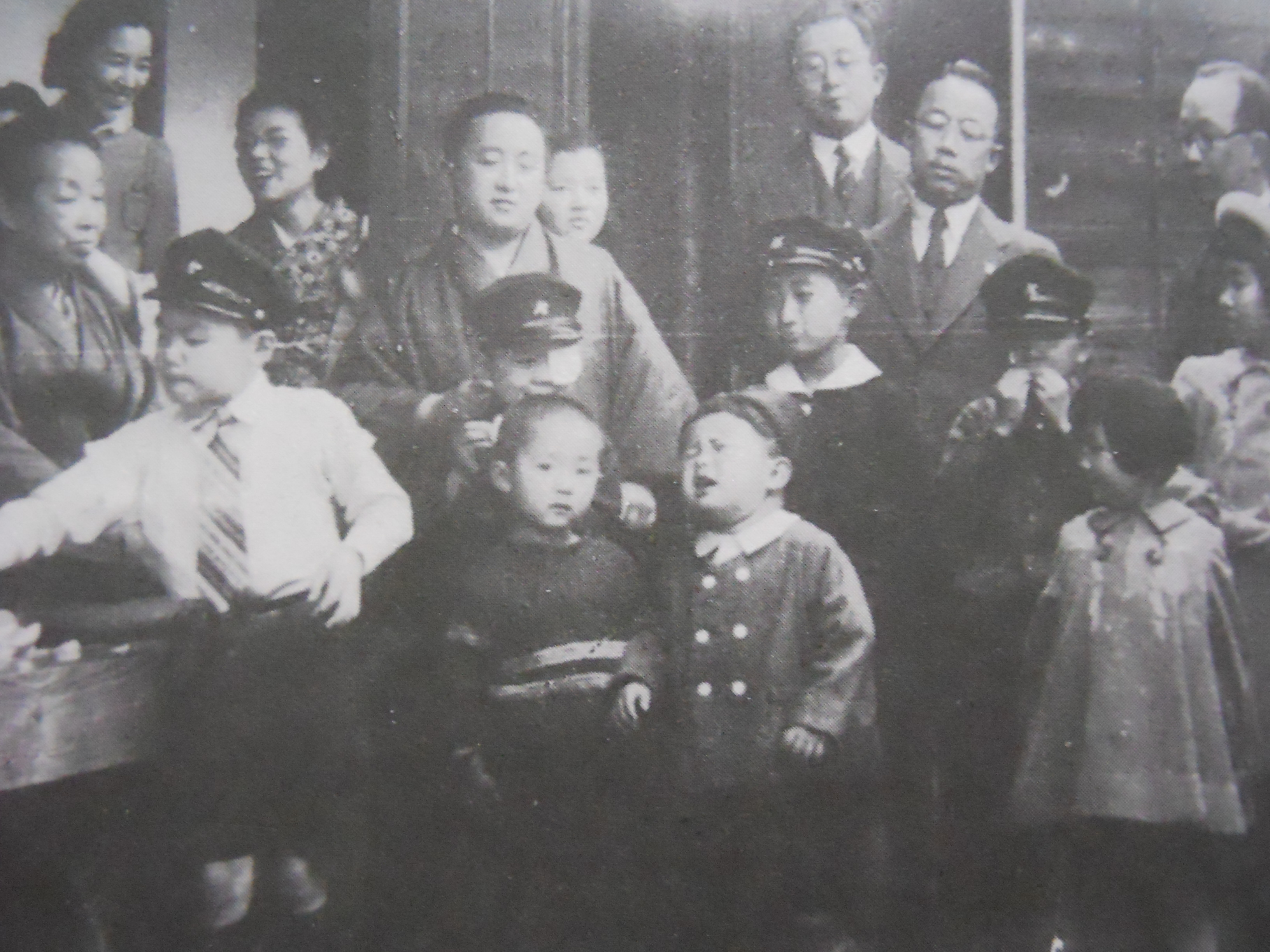 Ｈａｓｈｉｍｏｔｏ Clan